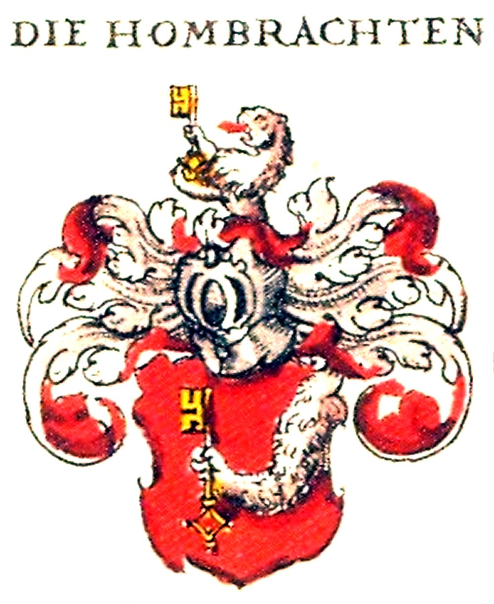 Wappen der Frankfurter Patrizierfamilie Humbracht